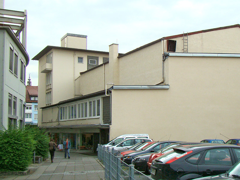 Synagogenweg in Heilbronn, rechts der mit einem Kinogebäude überbaute frühere Standort der Synagoge